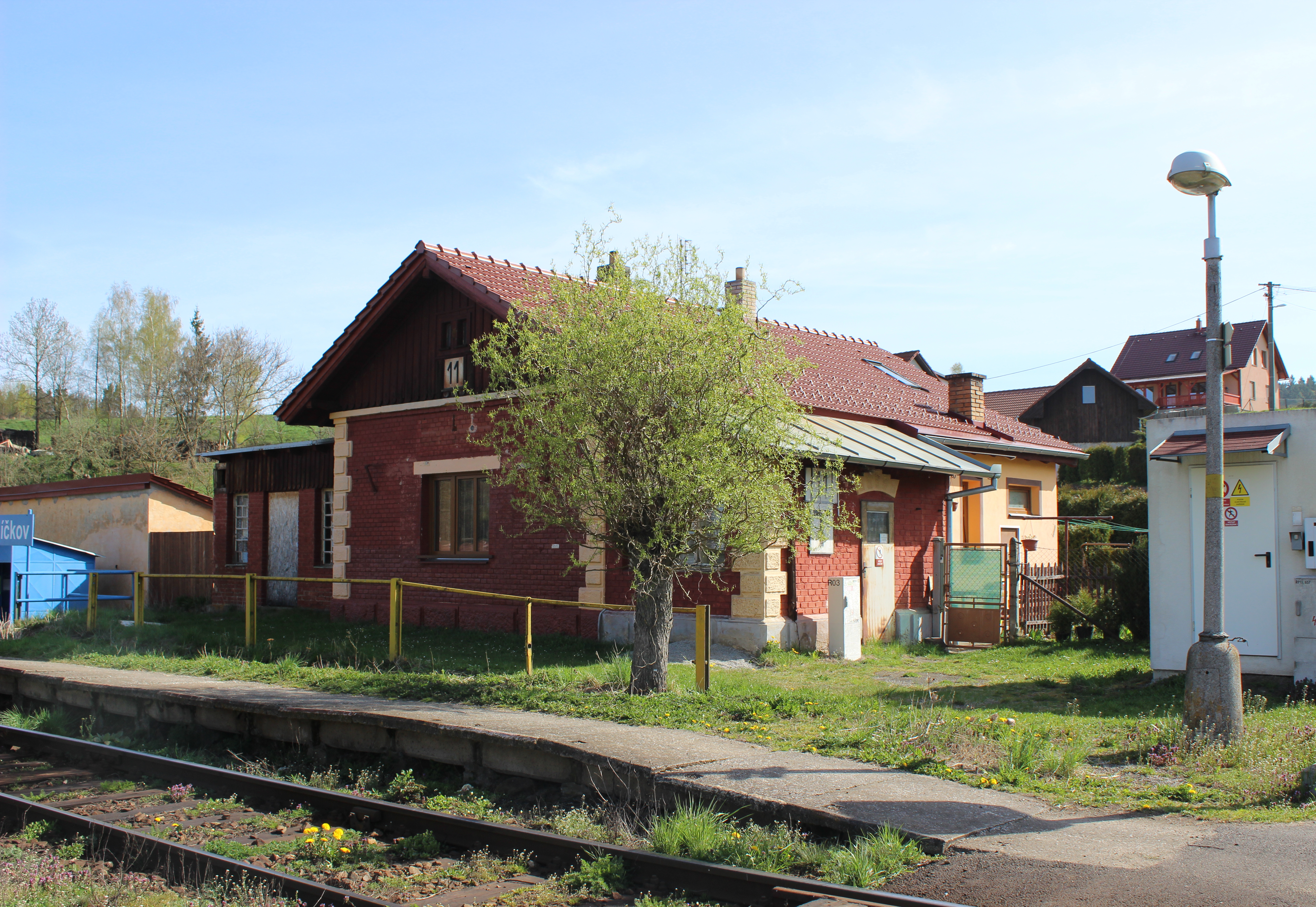 Železniční domek v Zajíčkově. Project: Fotíme Česko.